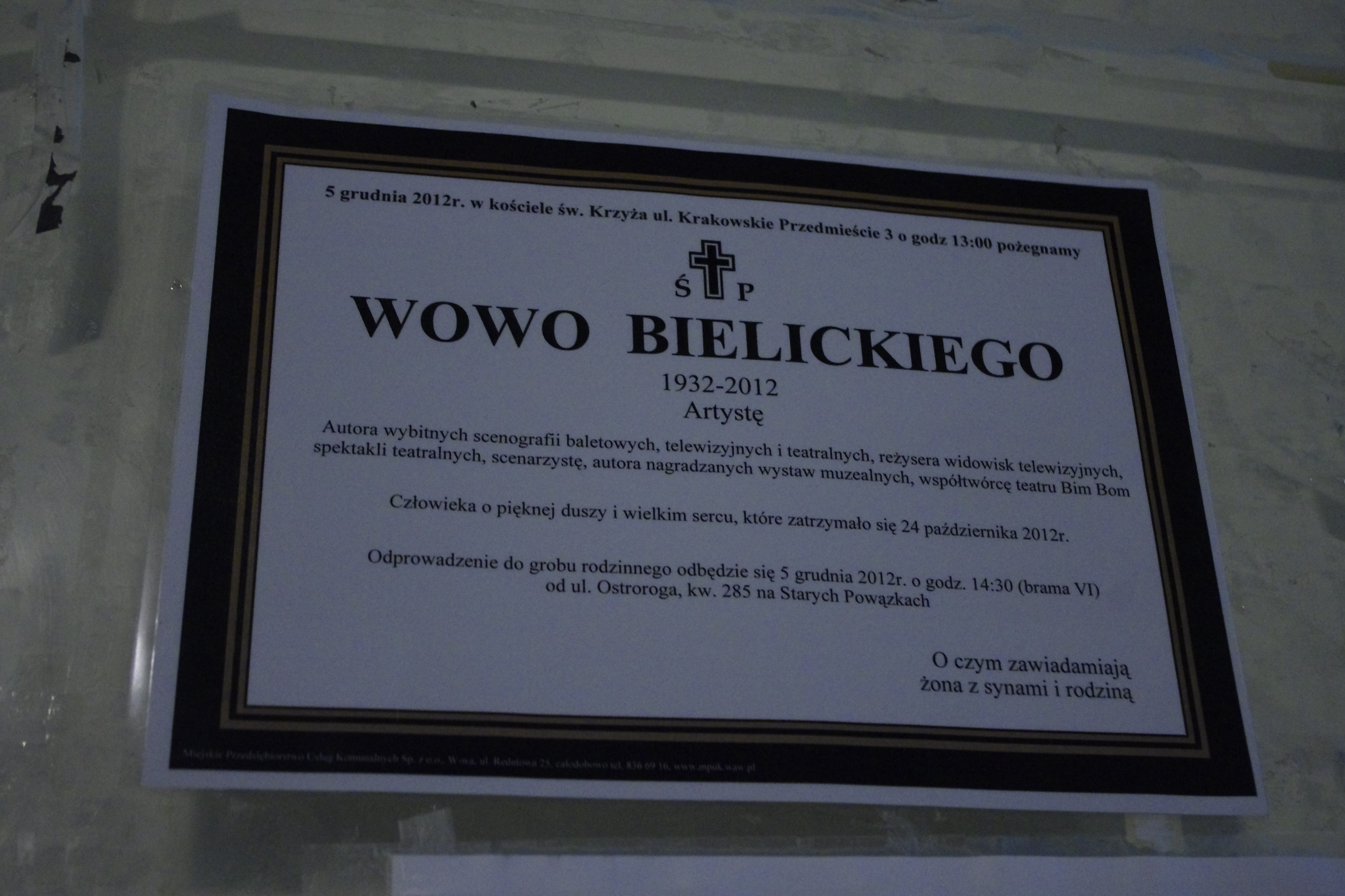 Nekrolog aktora, reżysera i scenarzysty Włodzimierza Bielickiego (Wowo Bielicki) przy wejściu do Kościoła św. Brata Alberta i św. Andrzeja Apostoła w Warszawie